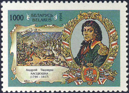 Беларуская (тарашкевіца): Андрэй Тадэвуш Касьцюшка. Белпошта